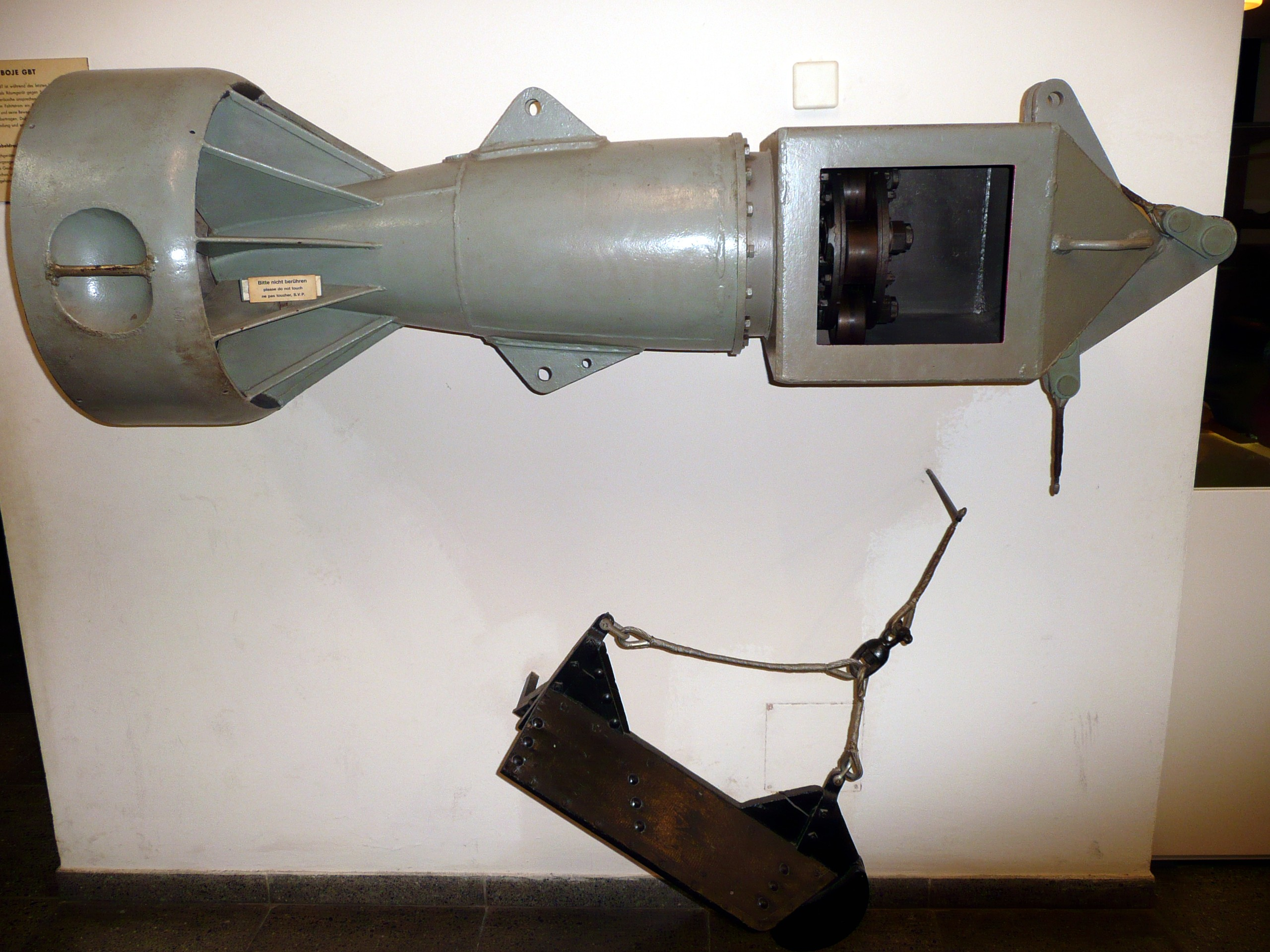 Mechanische Geräuschboje GBT. Das Gerät wurden von Minenräumfahrzeugen nachgeschleppt um akustisch gezündete Minen zu Räumen. Im Schwanzteil befindet sich ein Turbinenrad das im inneren der Boje ein "Klöppelwerk" antreibt von dem für Schiffe charakteristische Frequenzen erzeugt werden. Darunter ein hölzerner Giebeldrachen, der ursprünglich im Ersten Weltkrieg als Tiefendrachen für Räumgeschirr eingesetzt wurde. Beim GBT diente er zur Stabilierrung. Ausgestellt im deutschen Museum München.